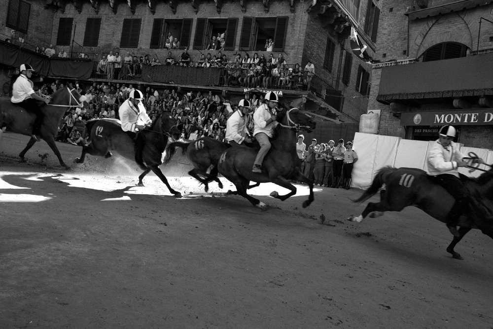 Da sinistra a destra: Farsalo, Elysyrio, Mary Monella e Lu Mutu di Gallura in batteria.